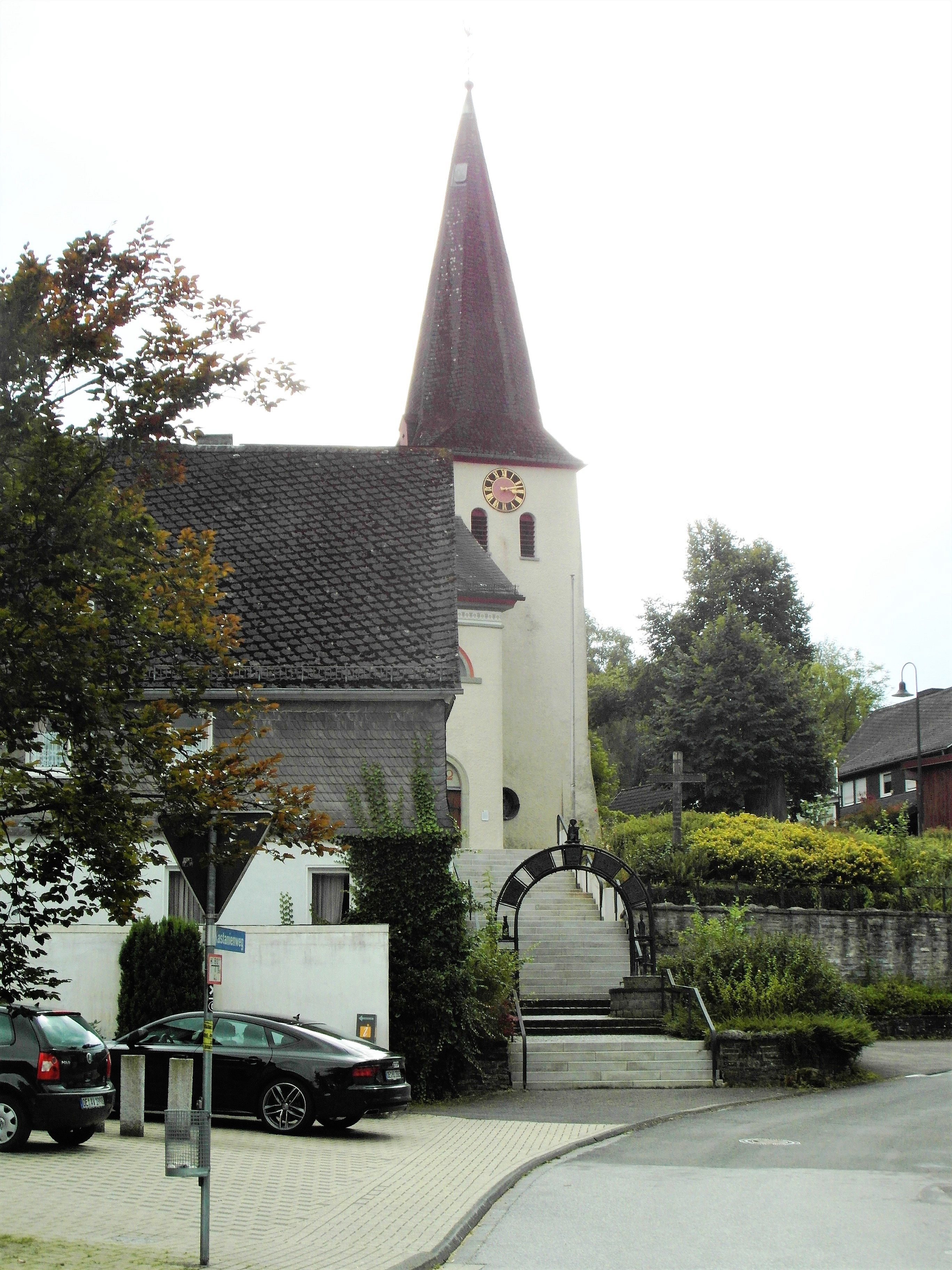 Blick auf St. Burchard in Oedingen vom Park aus